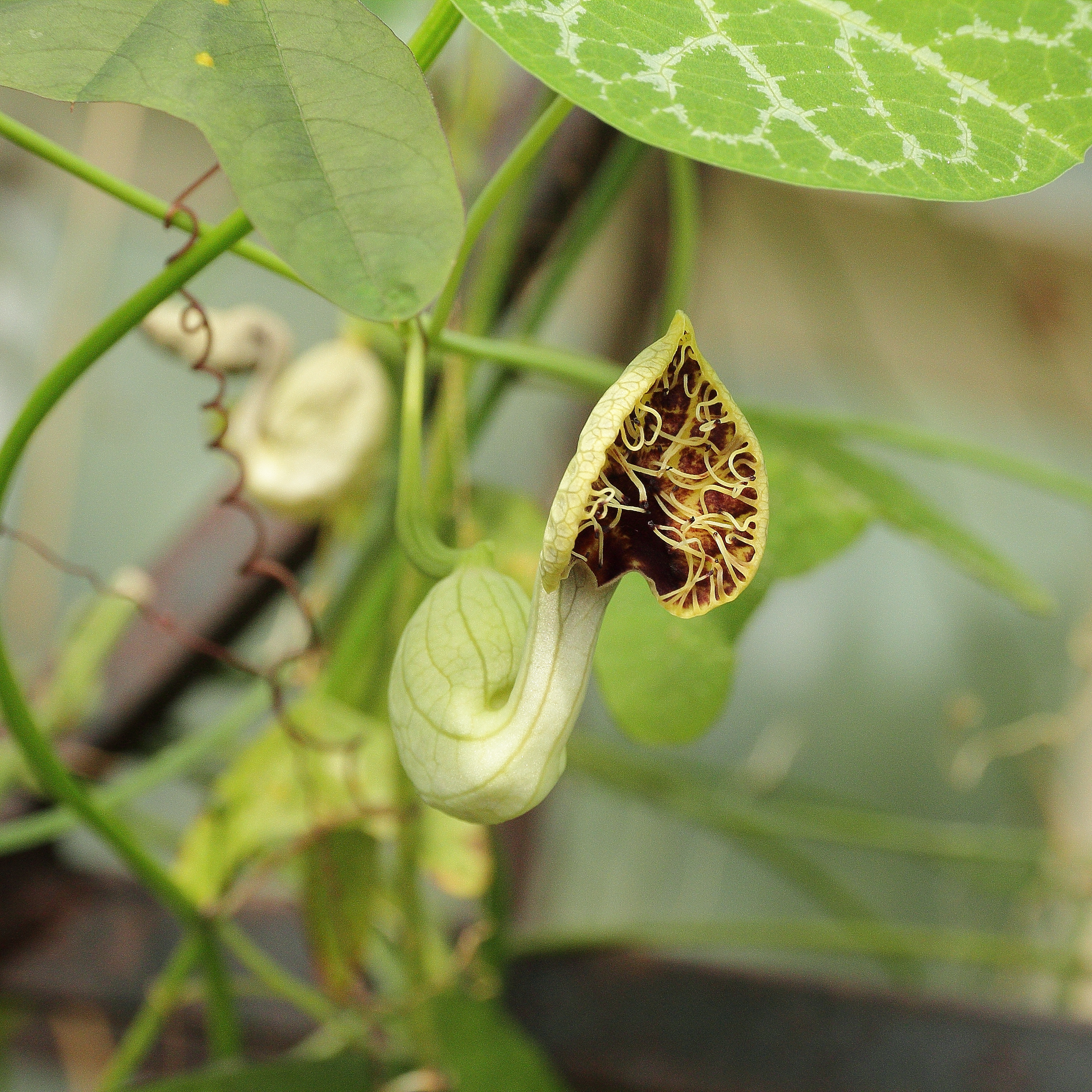 Aristolochia fimbriata i Göteborgs Botaniska Trädgård.